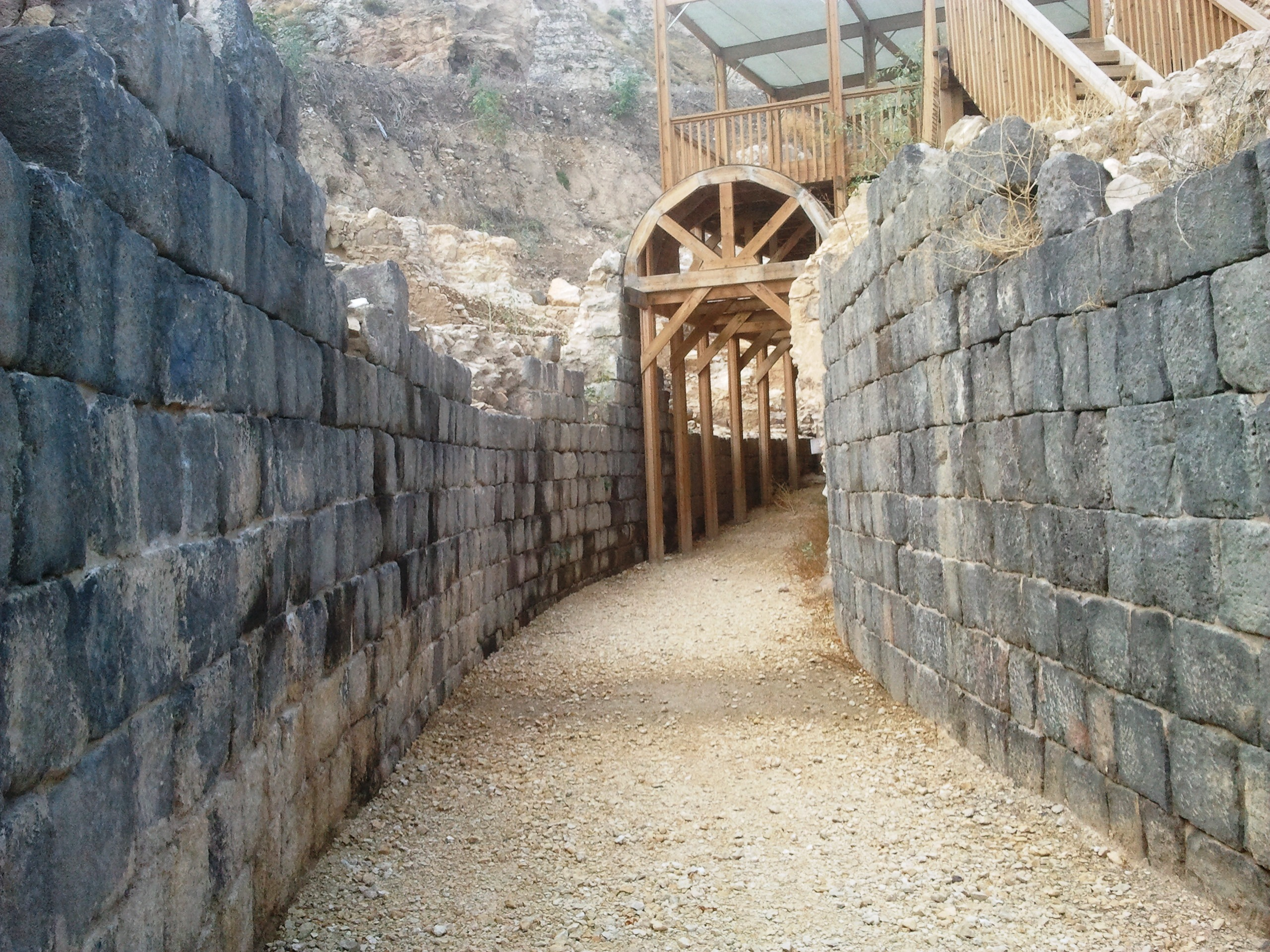 התיאטרון הרומי בטבריה הוא אתר ארכאולוגי השוכן בחלקה הדרומי של טבריה באזור הפארק הארכאולוגי של העיר לרגלי הר ברניקי המעבר ההיקפי